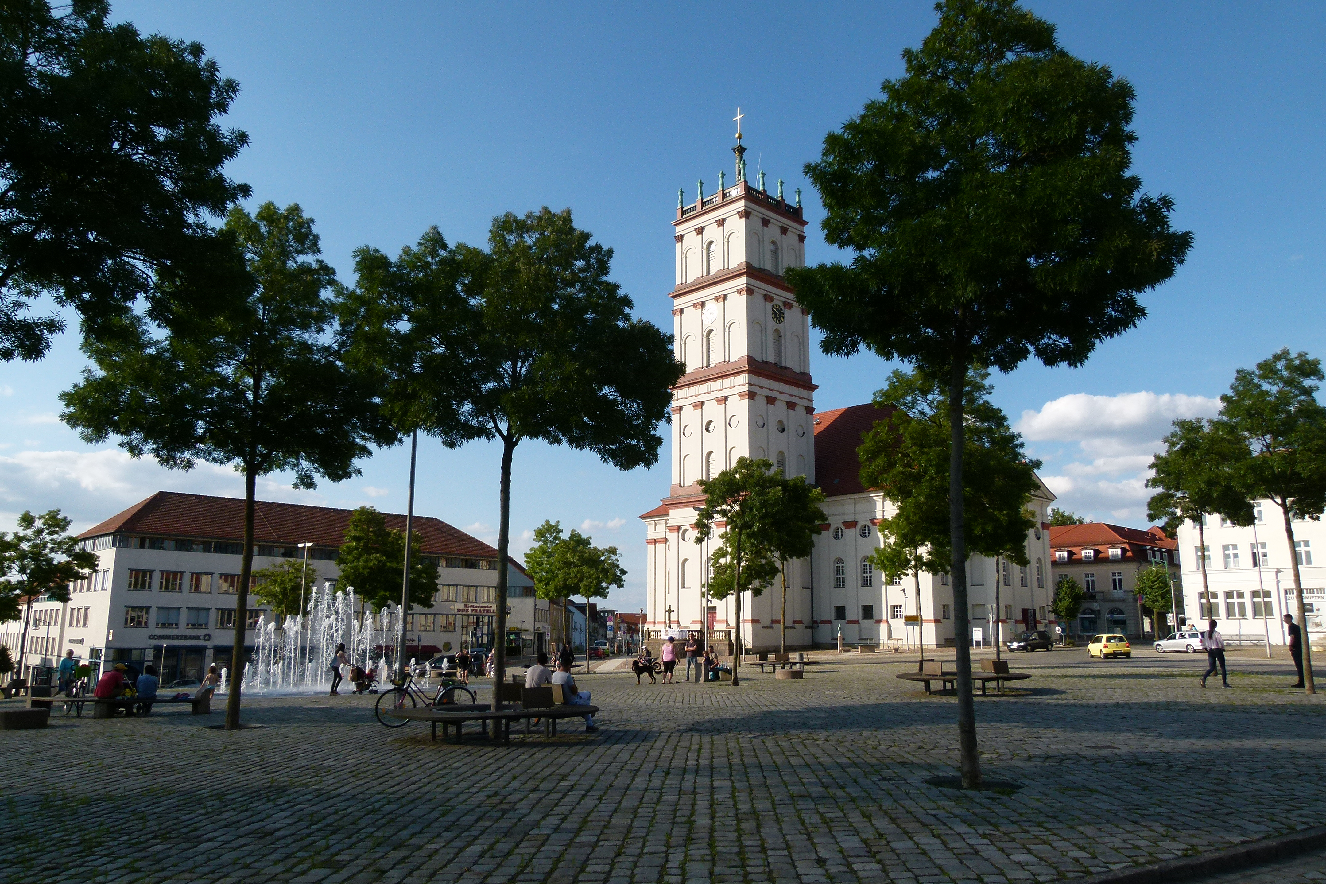 Neustrelitz-Marktplatz mit Stadtkirche